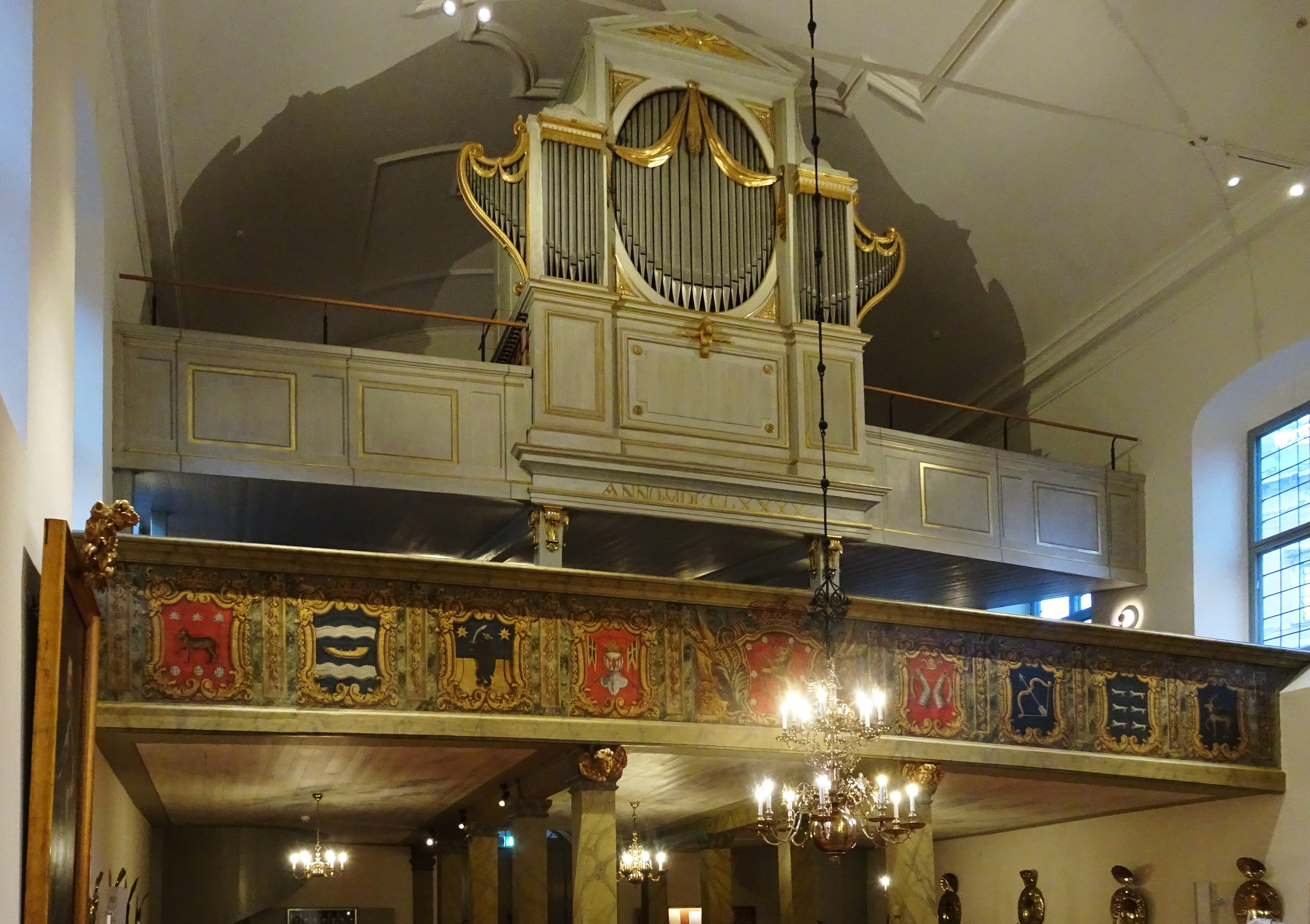 Finska kyrkan Stockholm - interiör